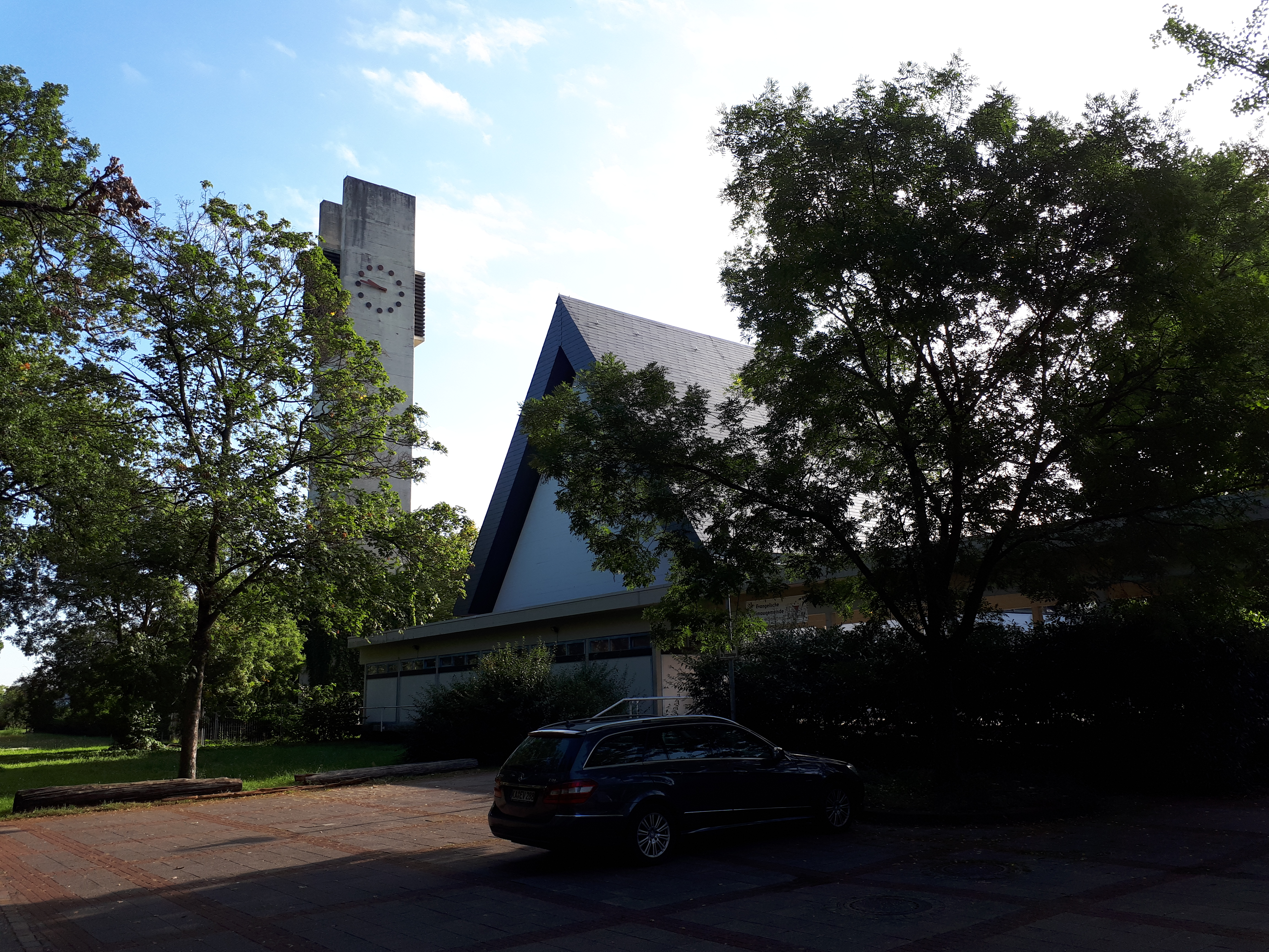 siehe [1]